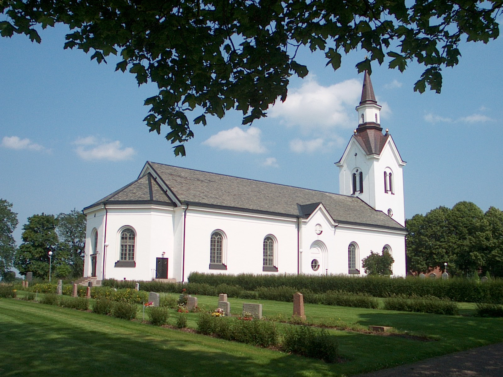 Högby kyrka.